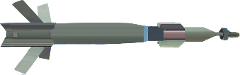 Авионска бомба Пејввеј 4.